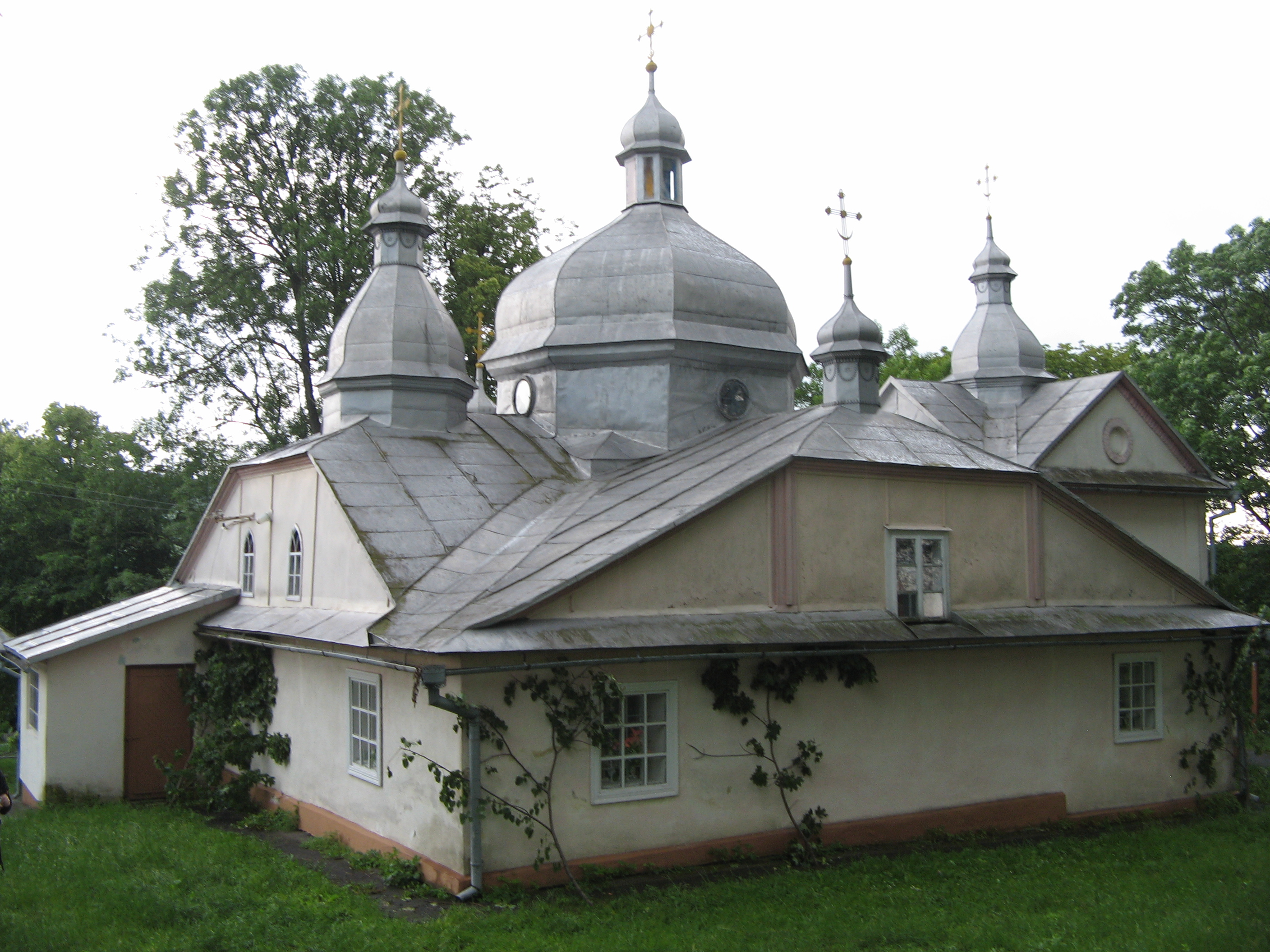 Церква Св. Юрія (дер.), Накваша, 1795